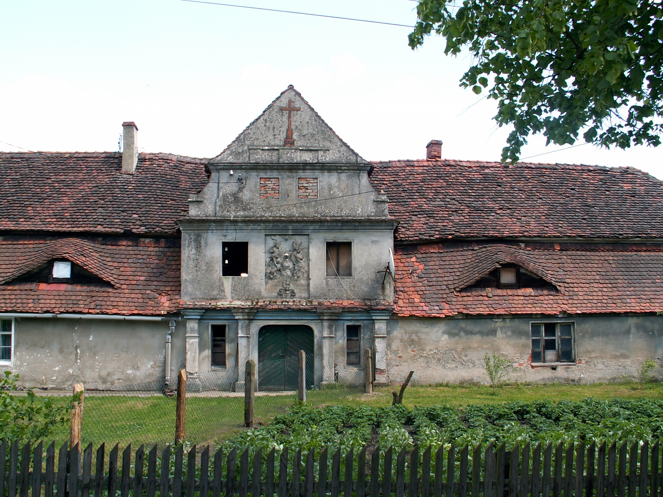 Broniszów - barokowy szpital w zespole pałacowym (zabytek nr 294 z 12.04.1961)